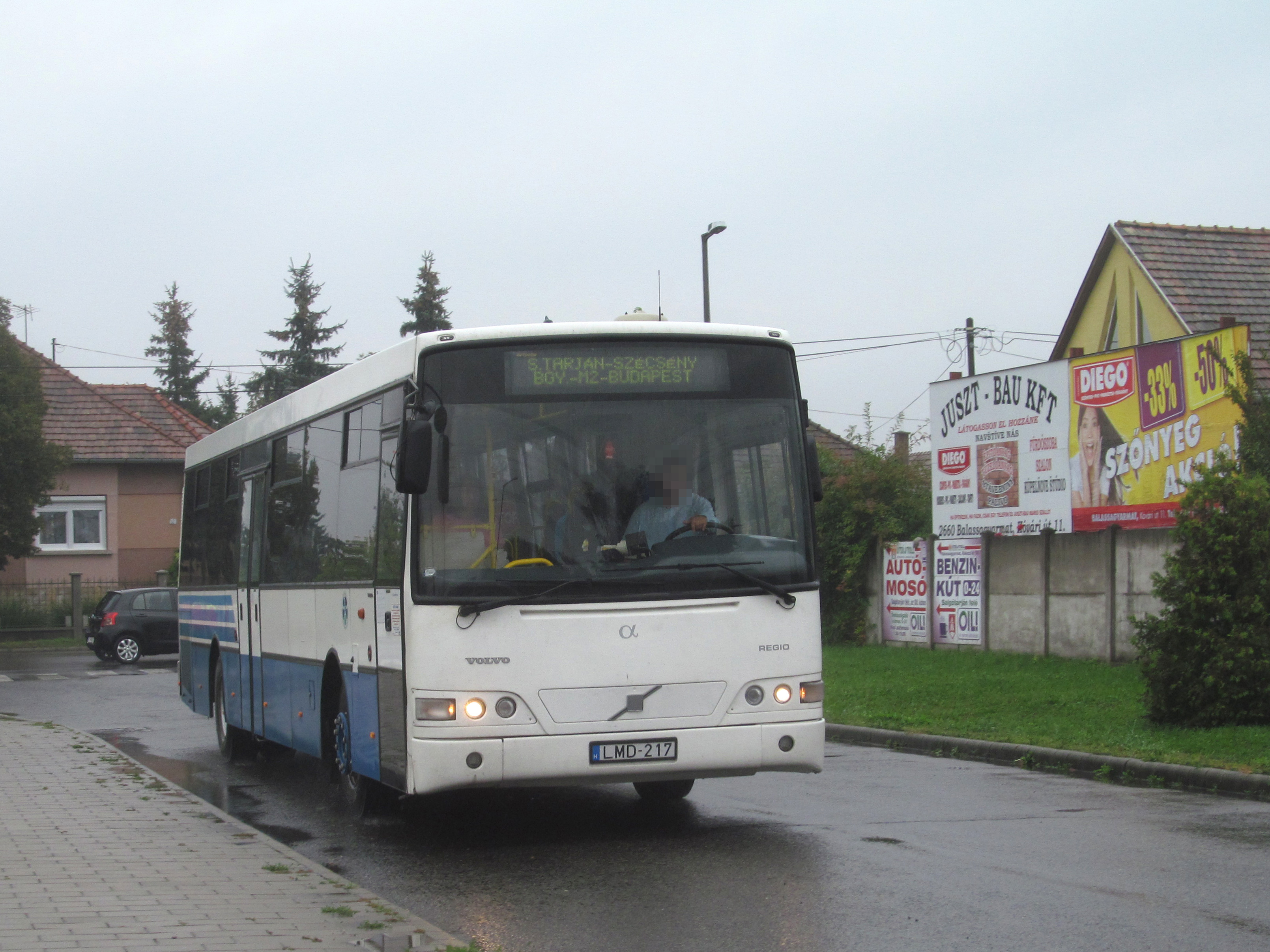 LMD-217 (KMC-163, FLM-538) Volvo-Alfa Regio (Balassagyarmat, autóbusz-állomás)